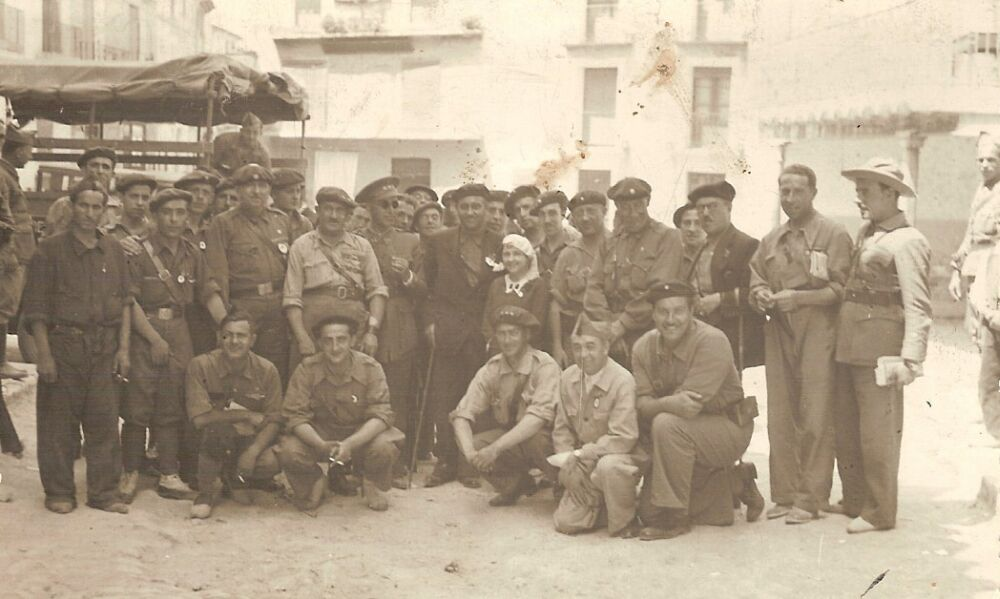 Tercio de requetés navarro "María de las Nieves"